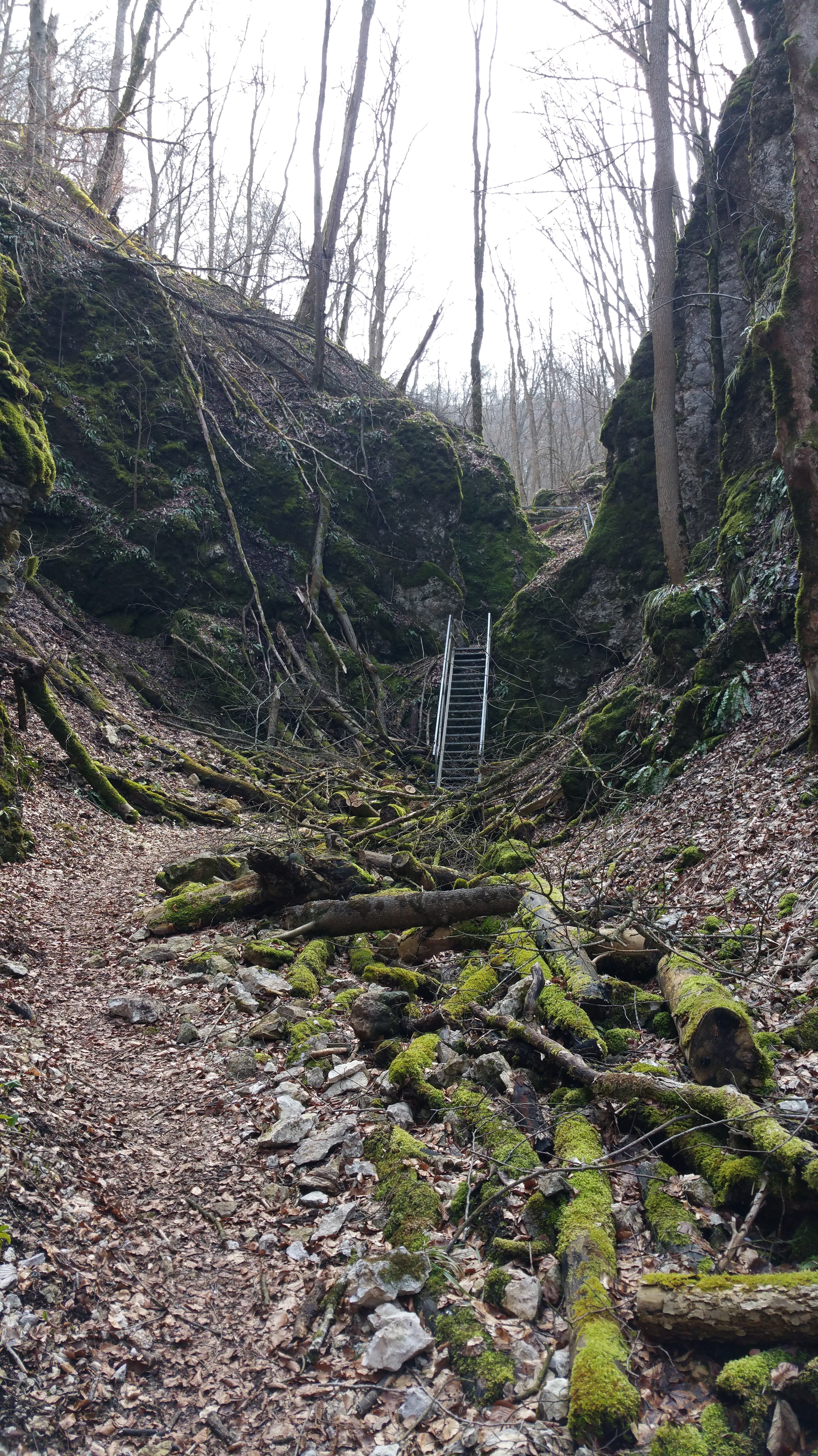 Felsental bei Eyach Kreis Göpingen nähe Geislingen Steige